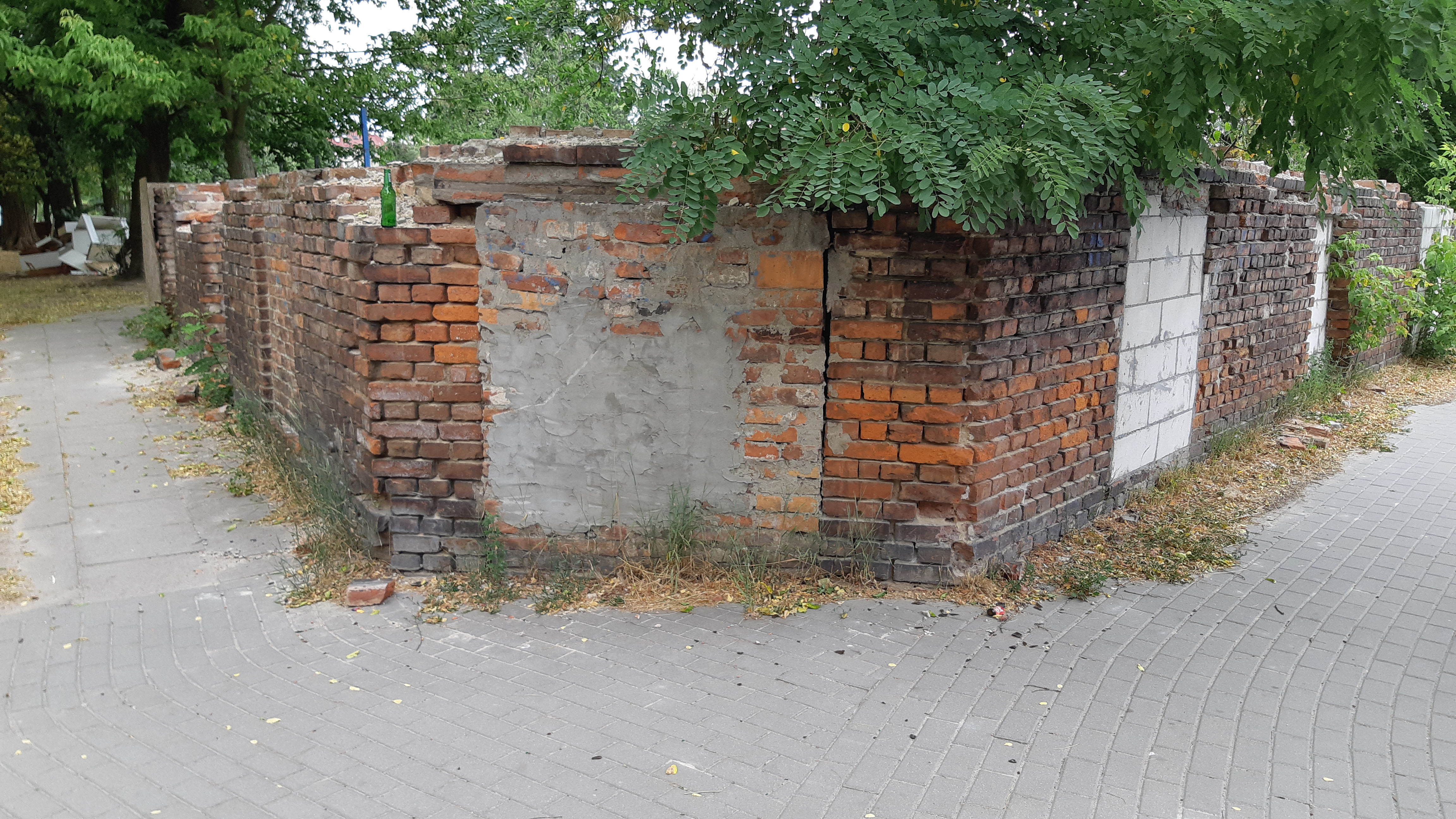 קיר שנותר מהבית האדום שהיה חלק מחוות ההכשרה בגרוכוב שלייד וורשה, פולין